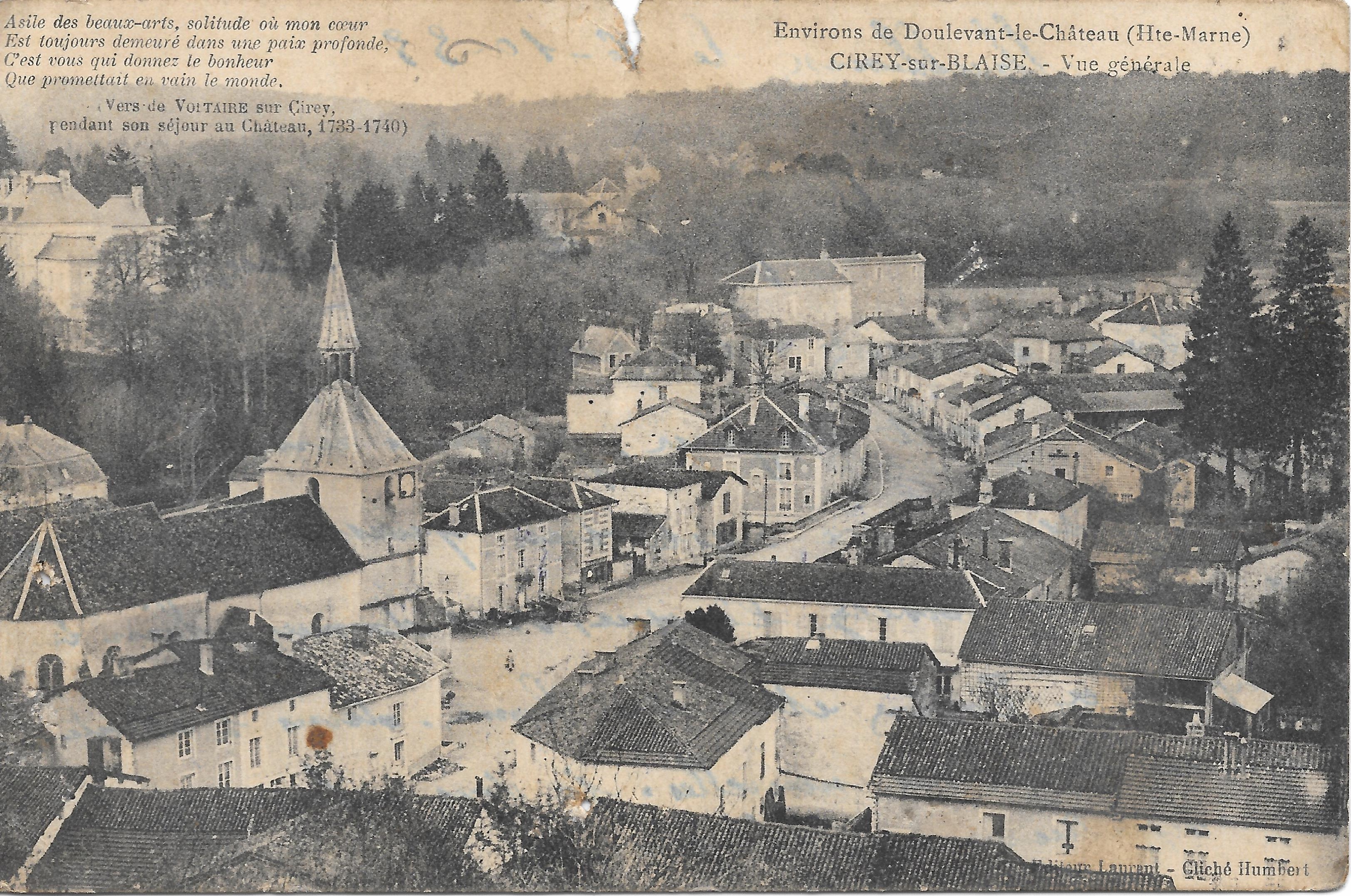 Panorama du bourg